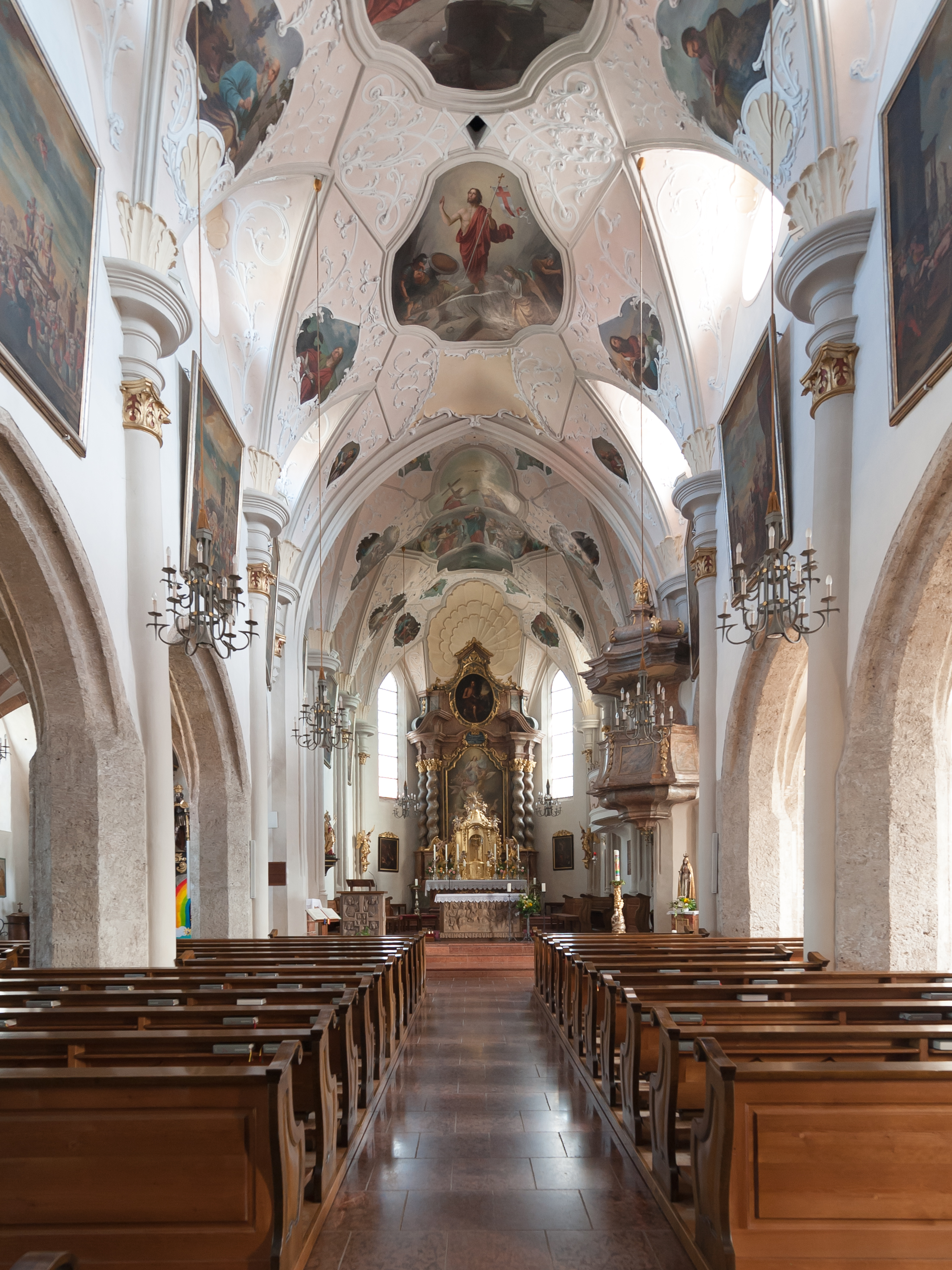 Aspach: Kath. Pfarrkirche Mariä Himmelfahrt und ehemaliger Kirchhof